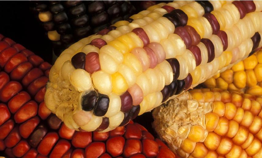 Pannocchia di mais che presenta carossidi di diversi colori, frutto dell'attività dei trasposoni Immagine tratta dal sito